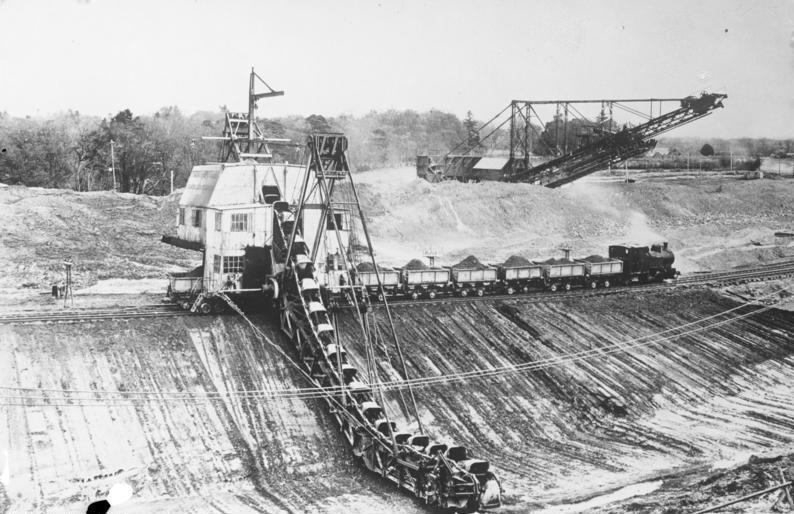 Im Zeitalter der Maschine! Maschinen, die die menschliche Arbeitskraft ersetzen. Millionen von Arbeitern werden durch die neuzeitliche Maschinentechnik aus ihren Berufen verdrängt. Ein Riesen-Ketten-Bagger beim Ausschachten eines Kanalbettes, eine Arbeit, die vondem von hunderten von Arbeitern verrichtet wurde.